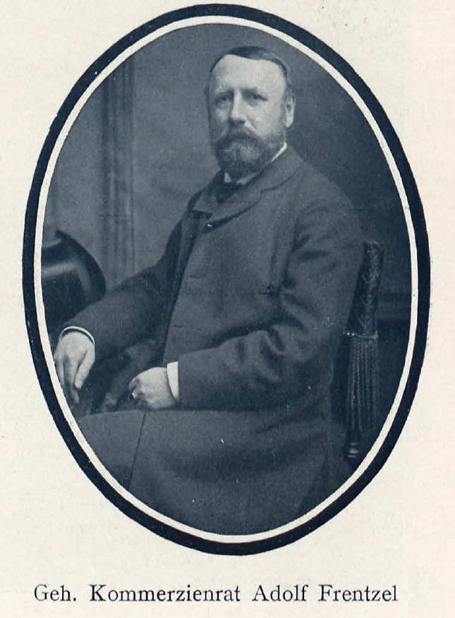 Adolf Frentzel (1833-1905), deutscher Kaufmann und Verbandsfunktionär, Abgeordneter des preußischen Herrenhauses.